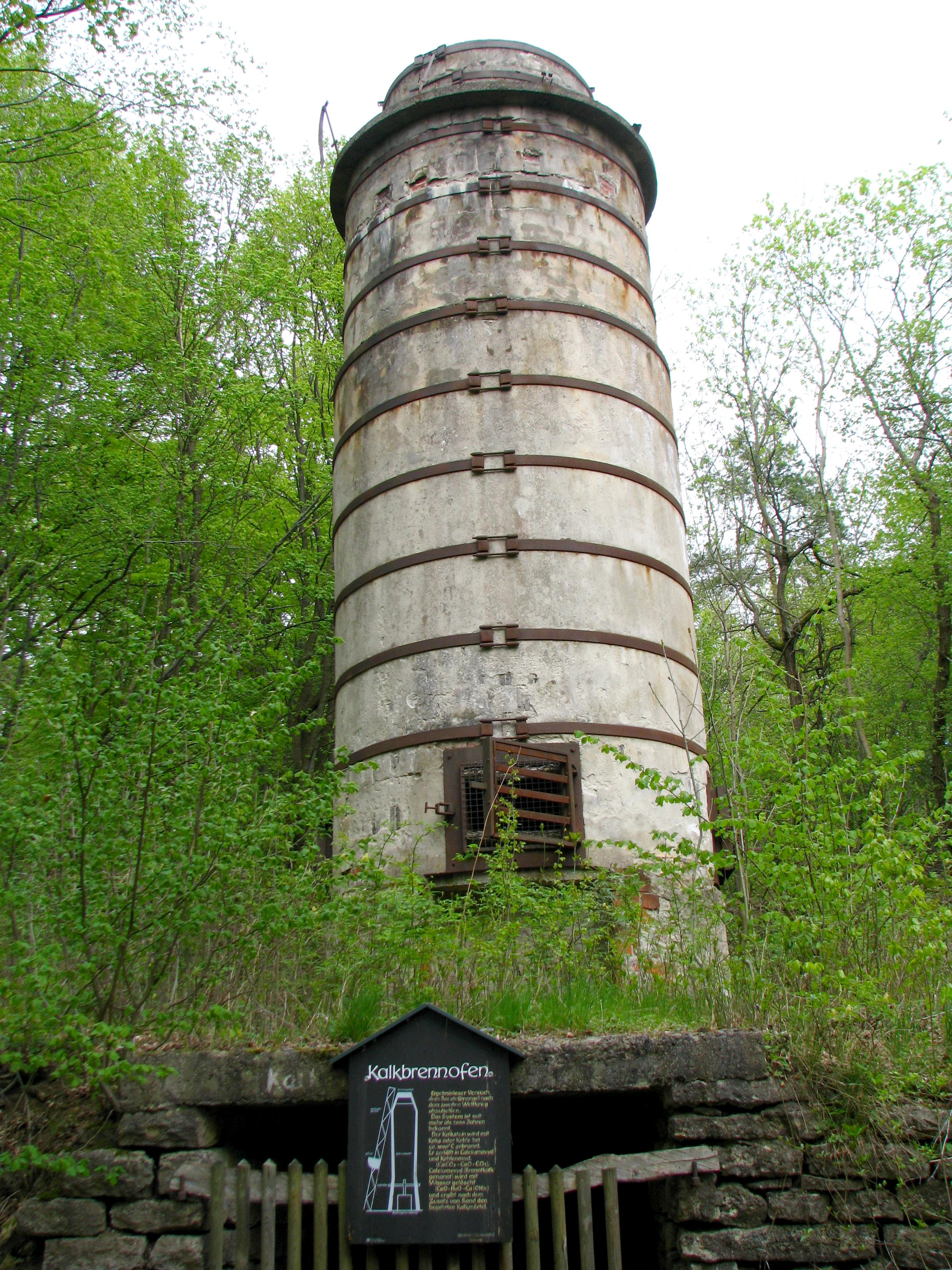 Kalkbrennofen auf der Gobert oberhalb Hitzelrode.